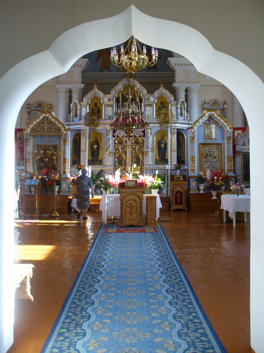 Зэльва. Свята-Троіцкая царква